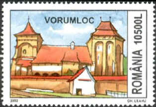 Source: Post of Romania